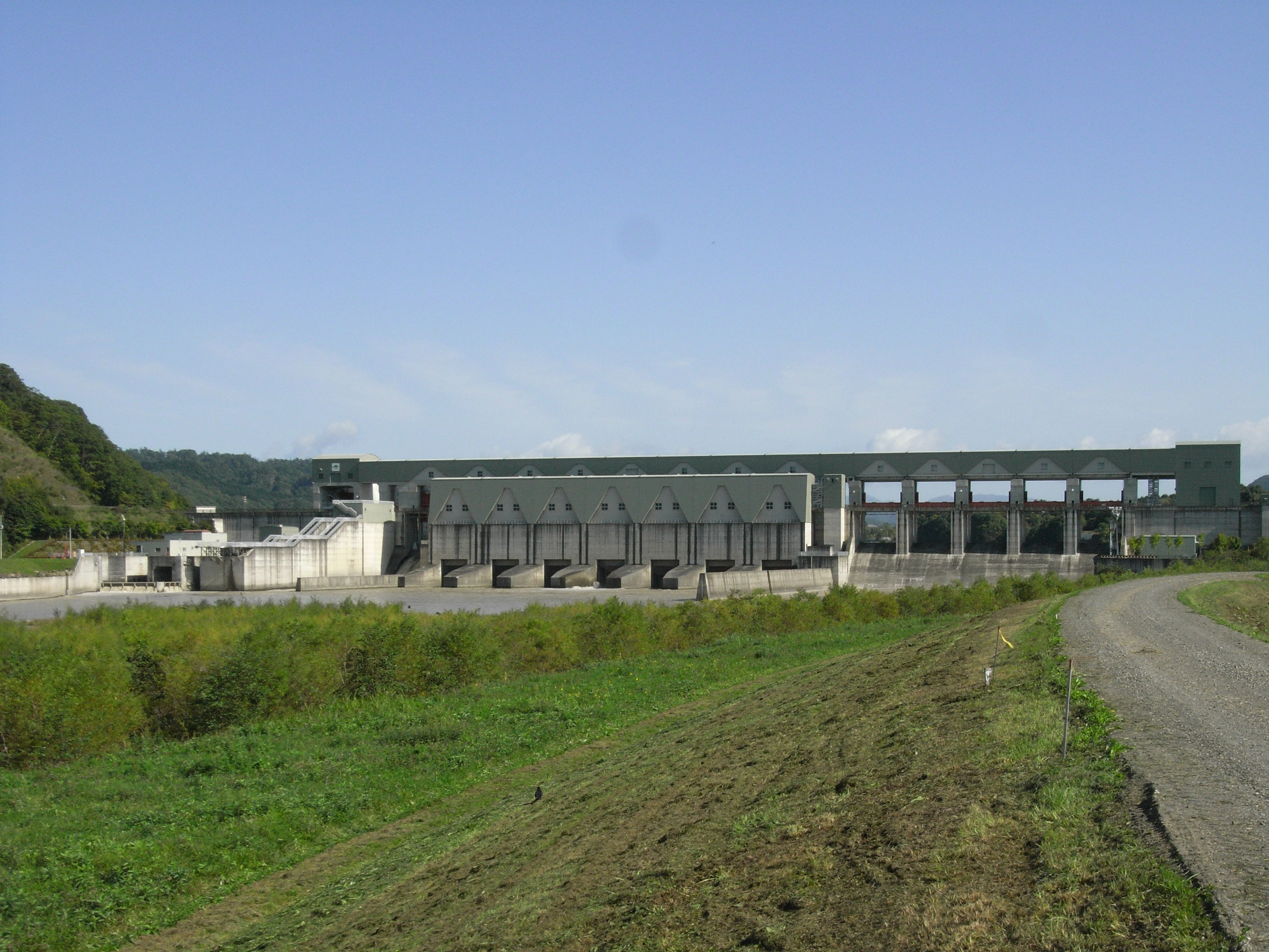 Dam